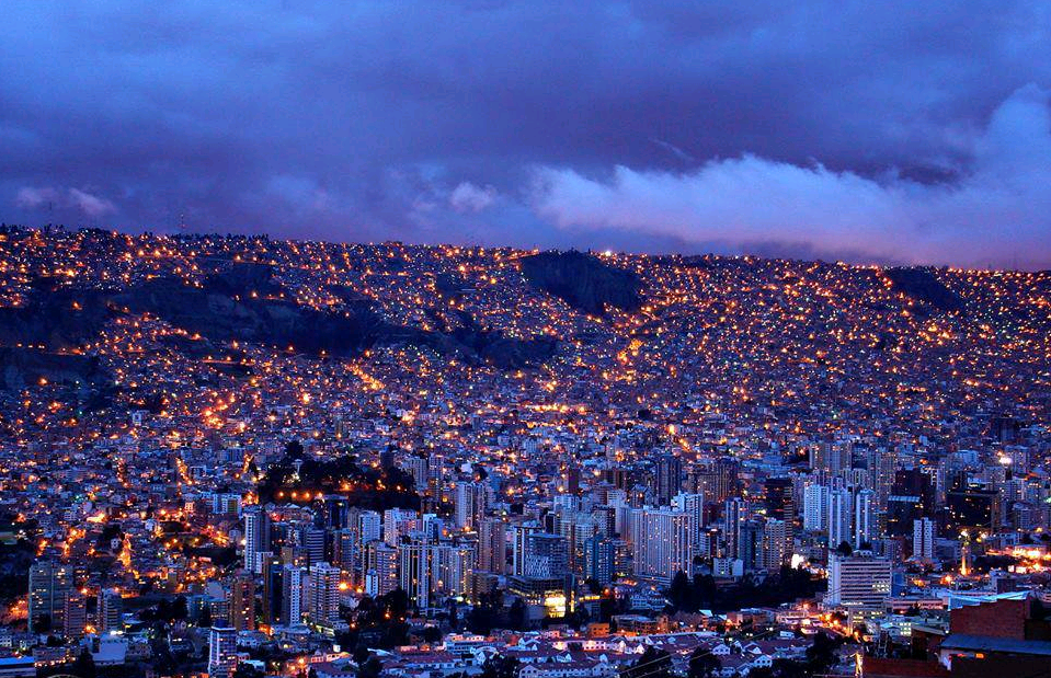 Vista de la ciudad de La Paz de noche